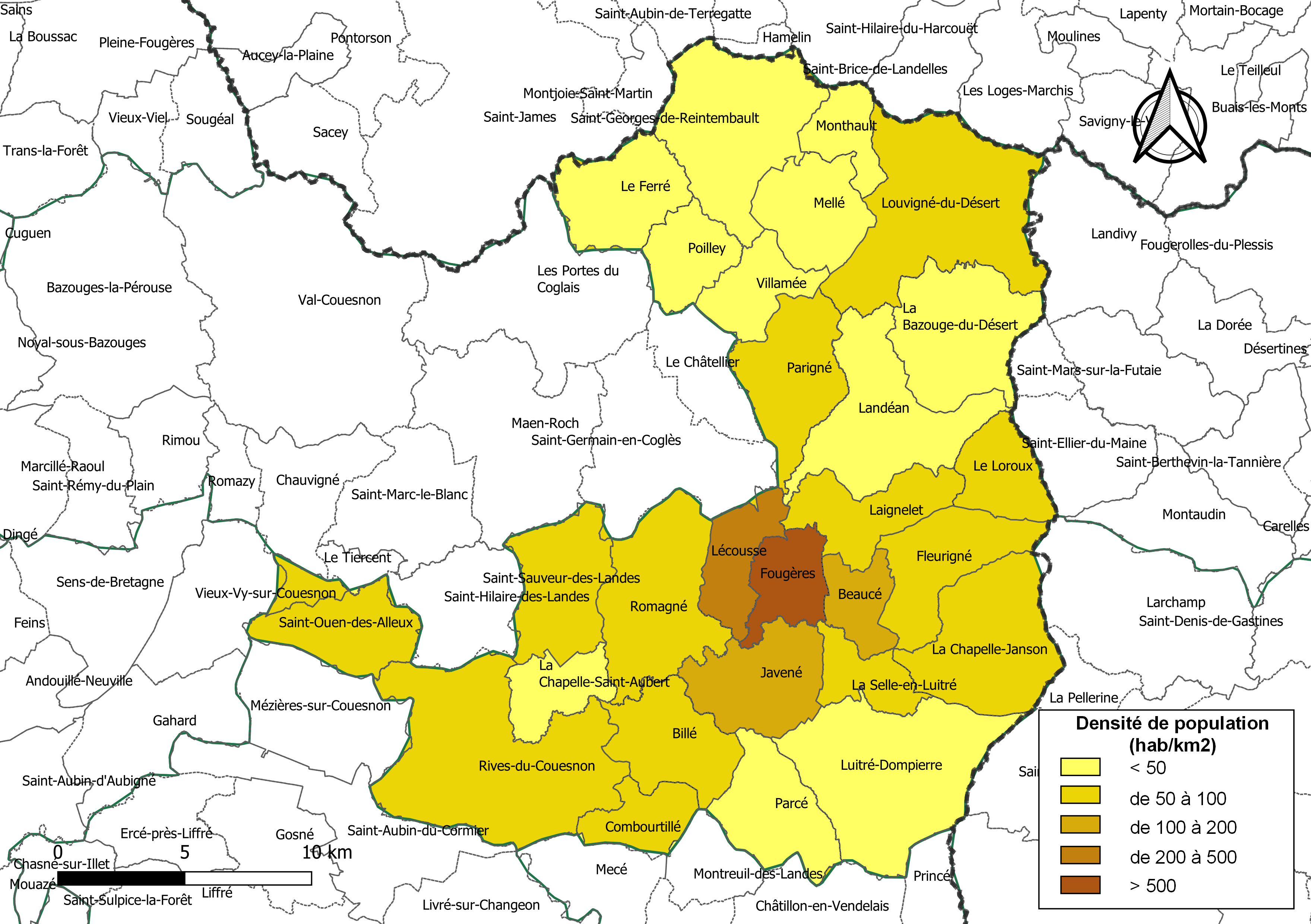 Carte des densités de population (millésimée 2016) des communes de l'intercommunalité Fougères Agglomération, département d'Ille-et-Vilaine, France. Composition au 1er janvier 2019.